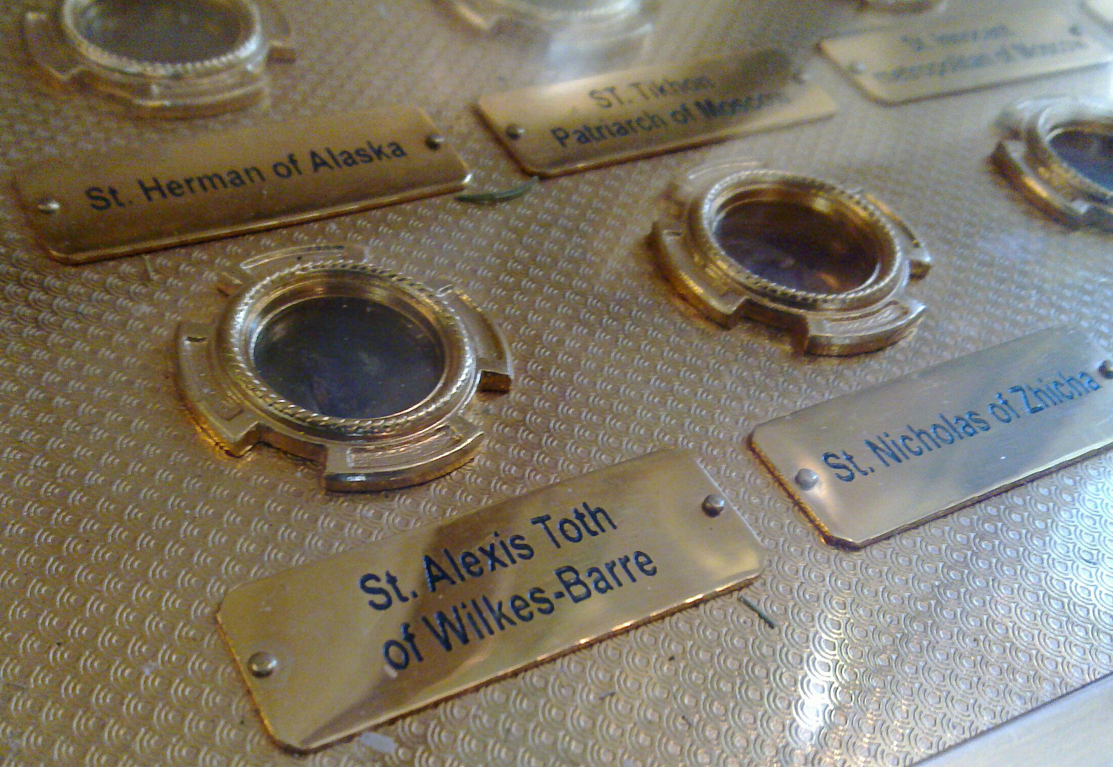 Мощи святого Алексия Товта в храме Святой Екатерины на Всполье (Москва)